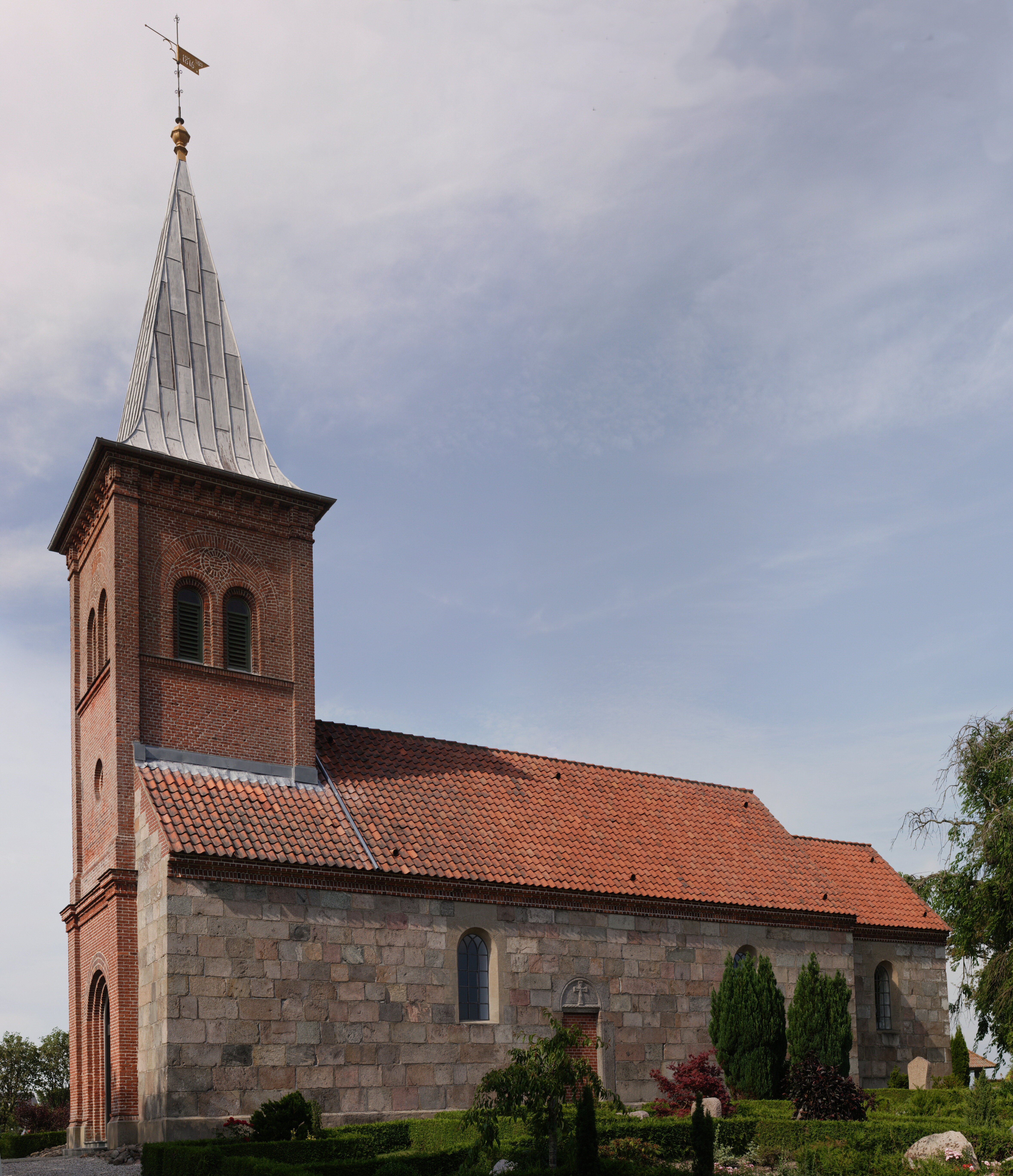 Trige Kirke